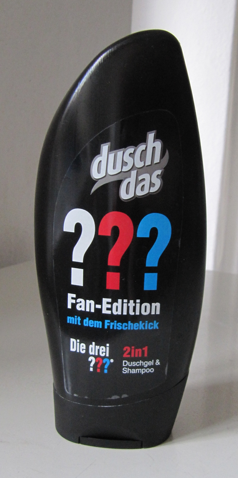 Drei-Fragezeichen-Fanduschgel (2015)